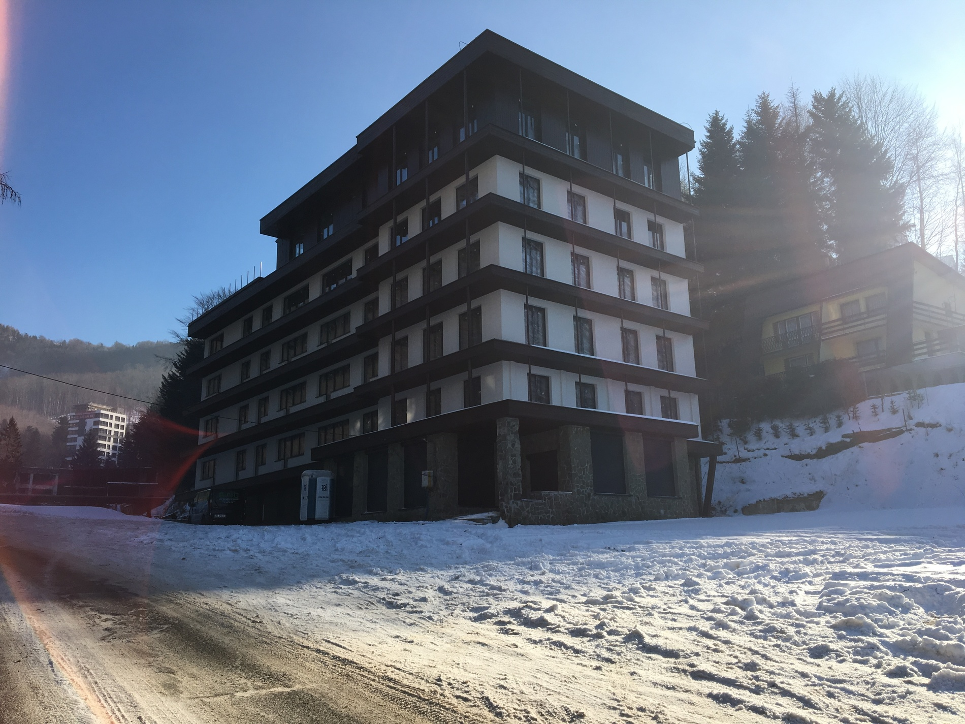 Zdjęcie z budowy nowego resortu wypoczynkowego Kozubnik.